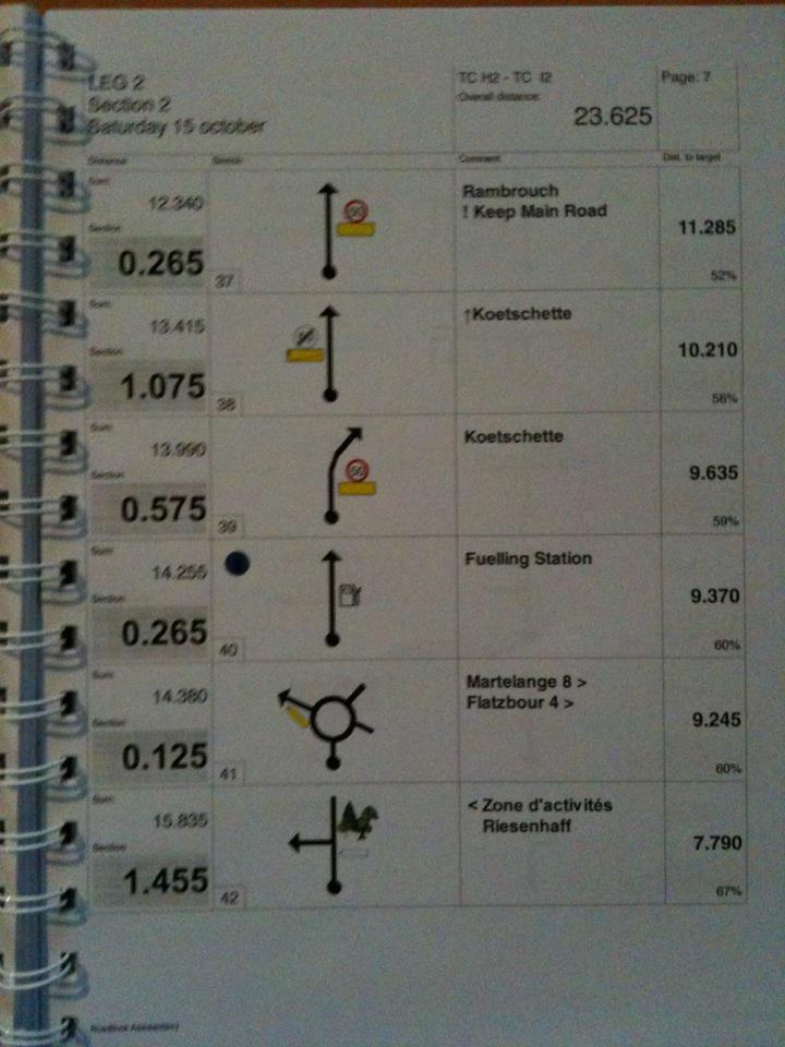 Das ist eine Aufgeschalgene Seite eines gebetbuches wie er im Motorsport (Rallye´s) benutzt wird